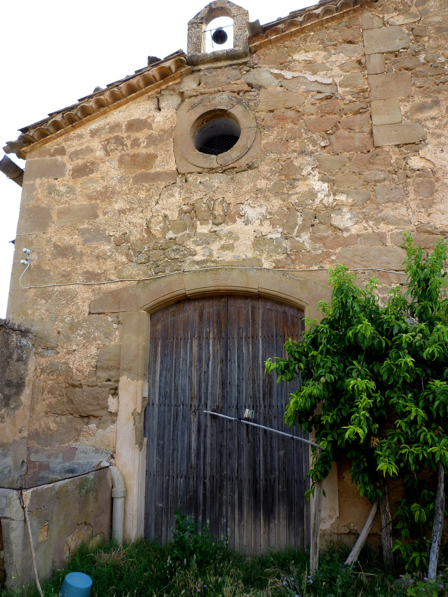 Masia el Bancal (Pinell de Solsonès): La capella